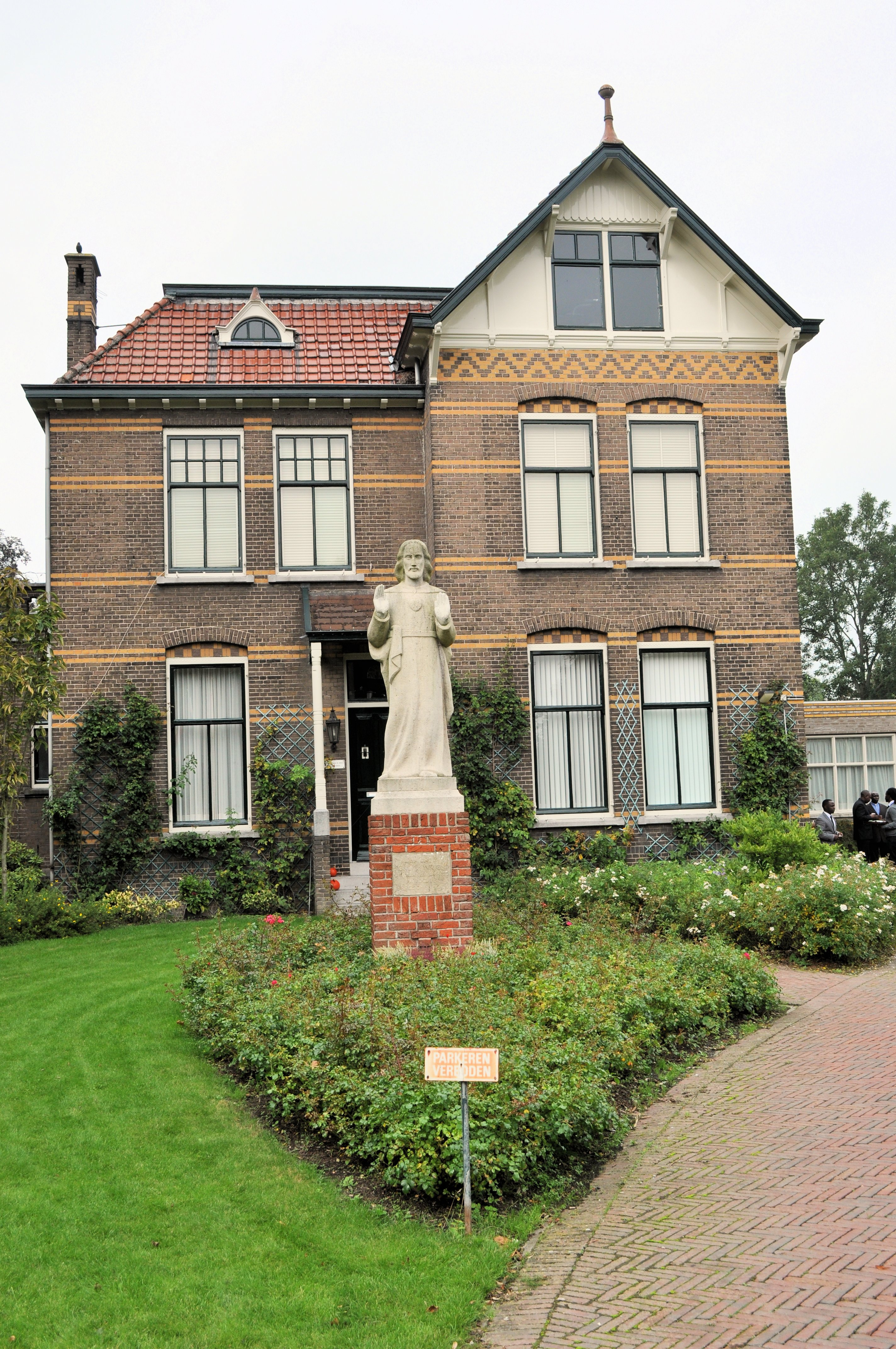 En ook de pastorie is van de heer Magry